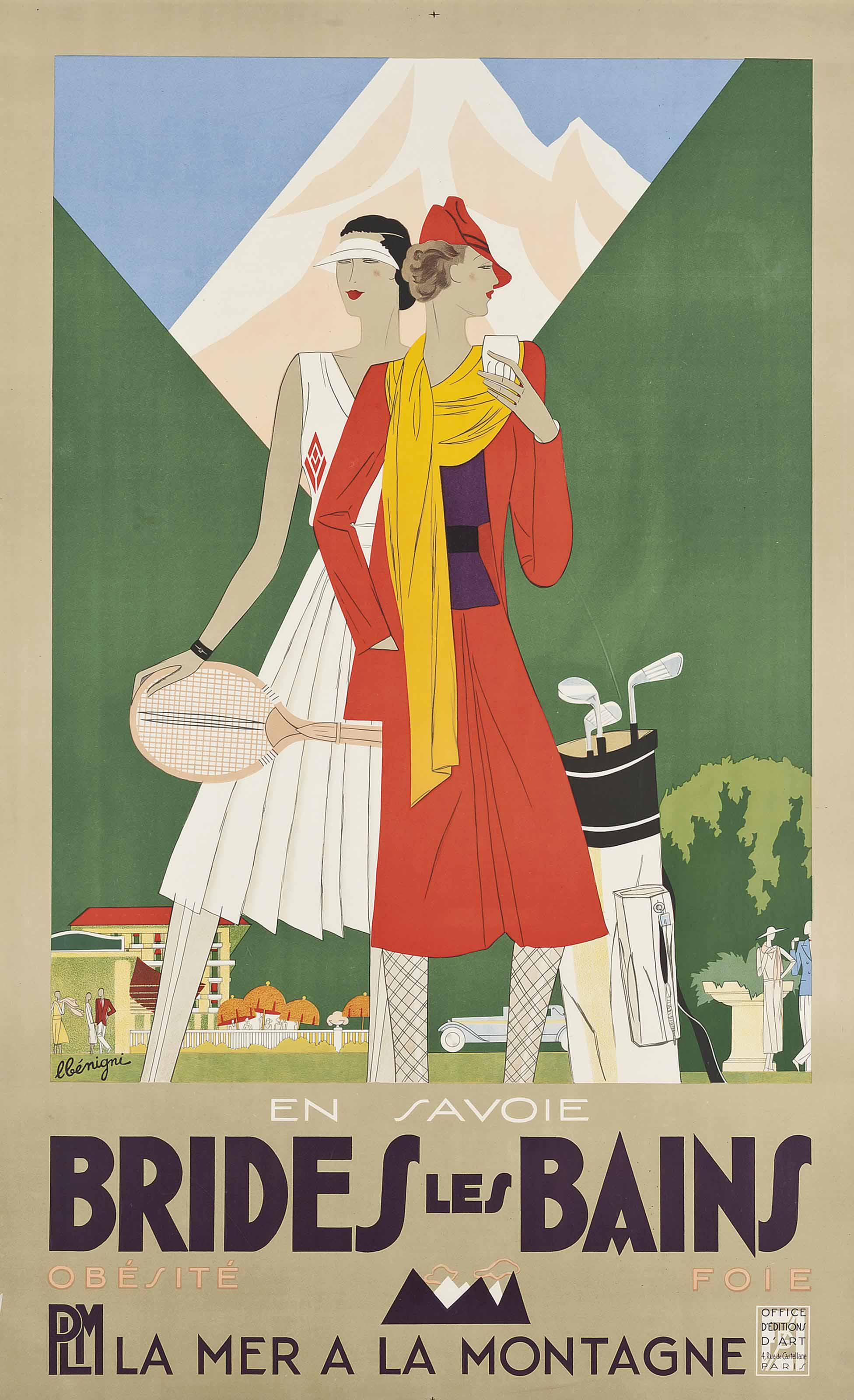 Von Léon Bénigni (1892-1948) um das Jahr 1929 geschaffenes Mode-Plakat mit zwei elegant gekleideten jungen Damen in Brides-les-Bains. Das originale Plakat wurde während einer Auktion von Christies im Jahr 2015 beim Ausruf von 1,625 GBP zugeschlagen ...